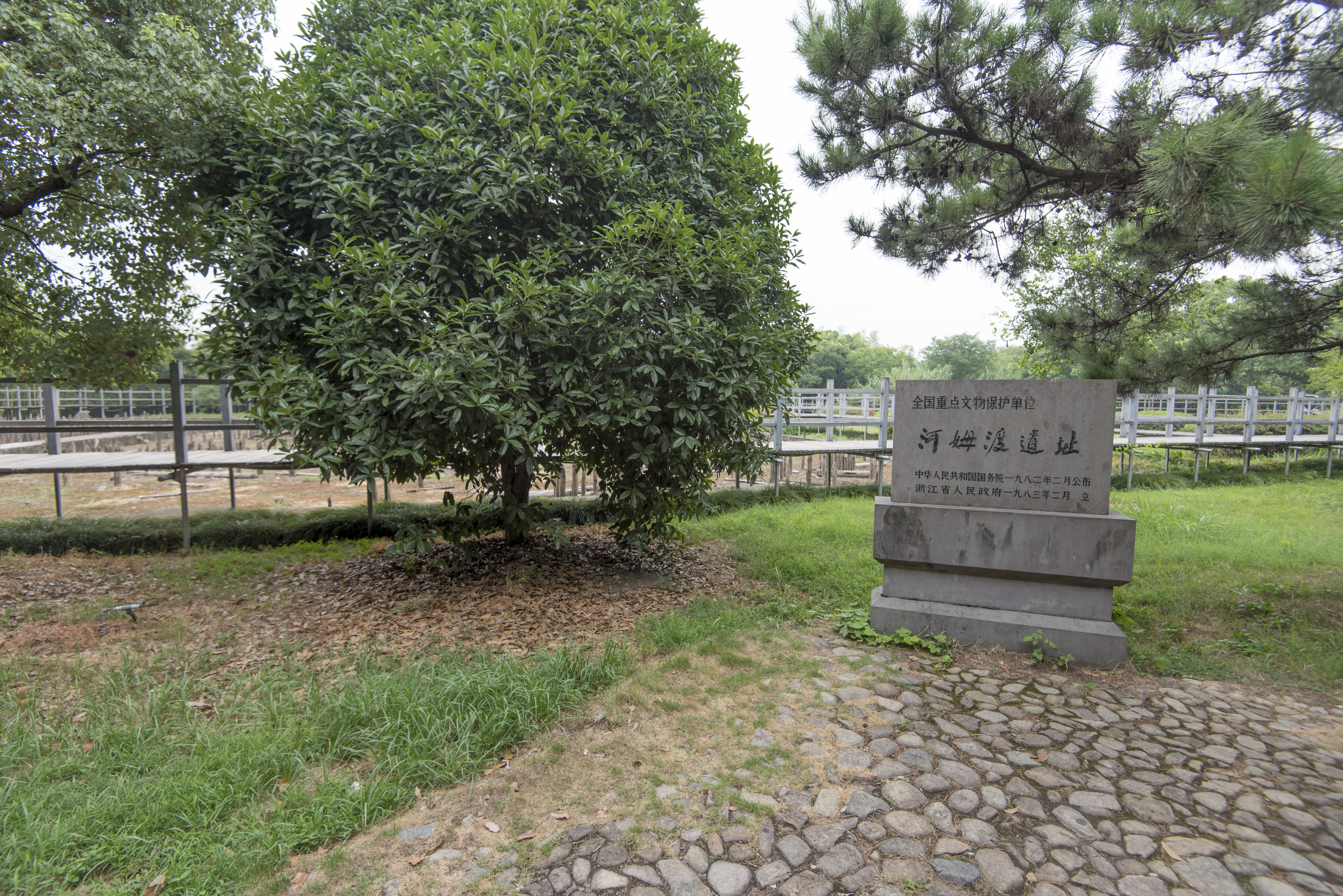 河姆渡遗址还原区